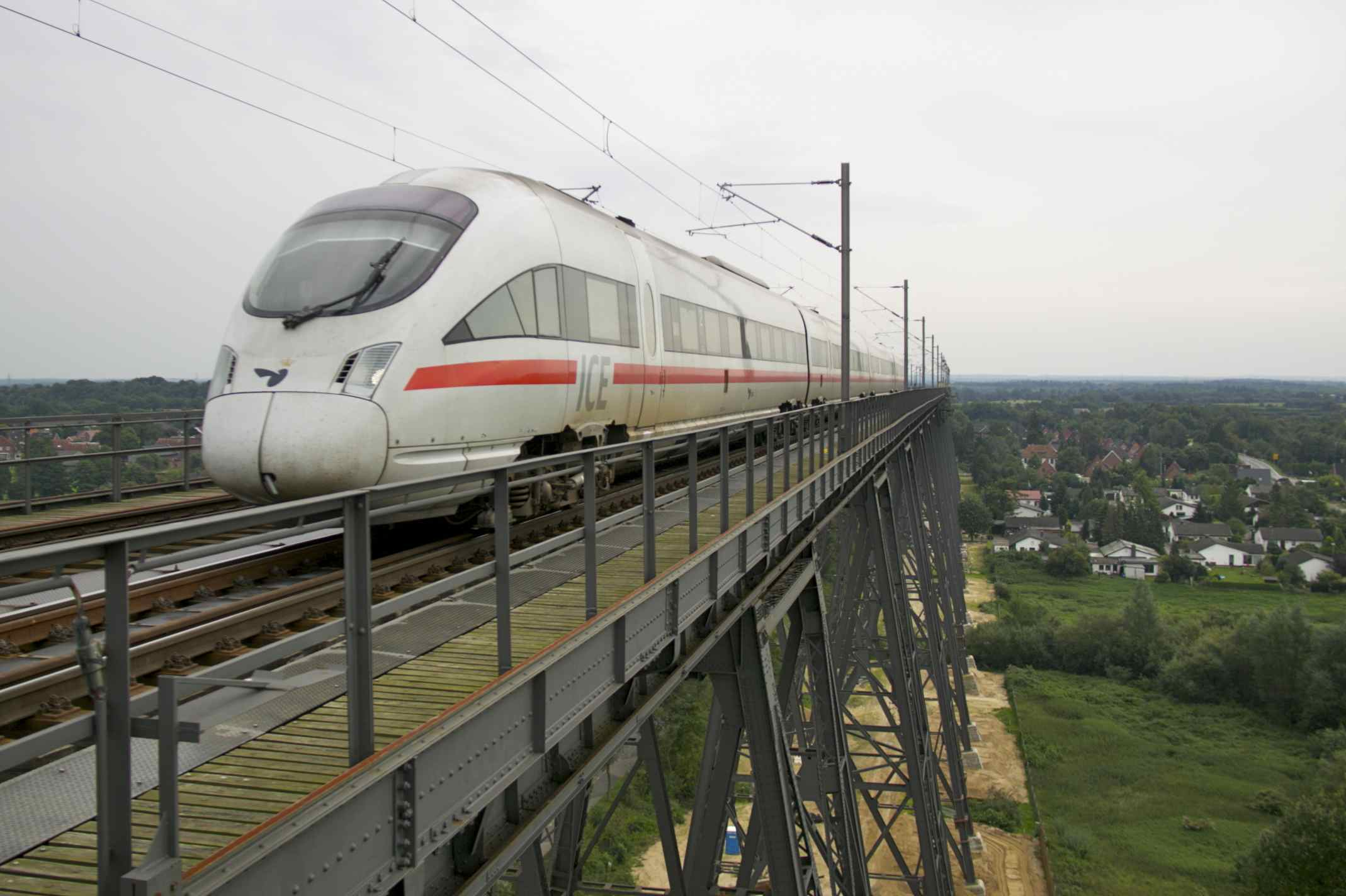 ICE auf Rendsburger Hochbrücke